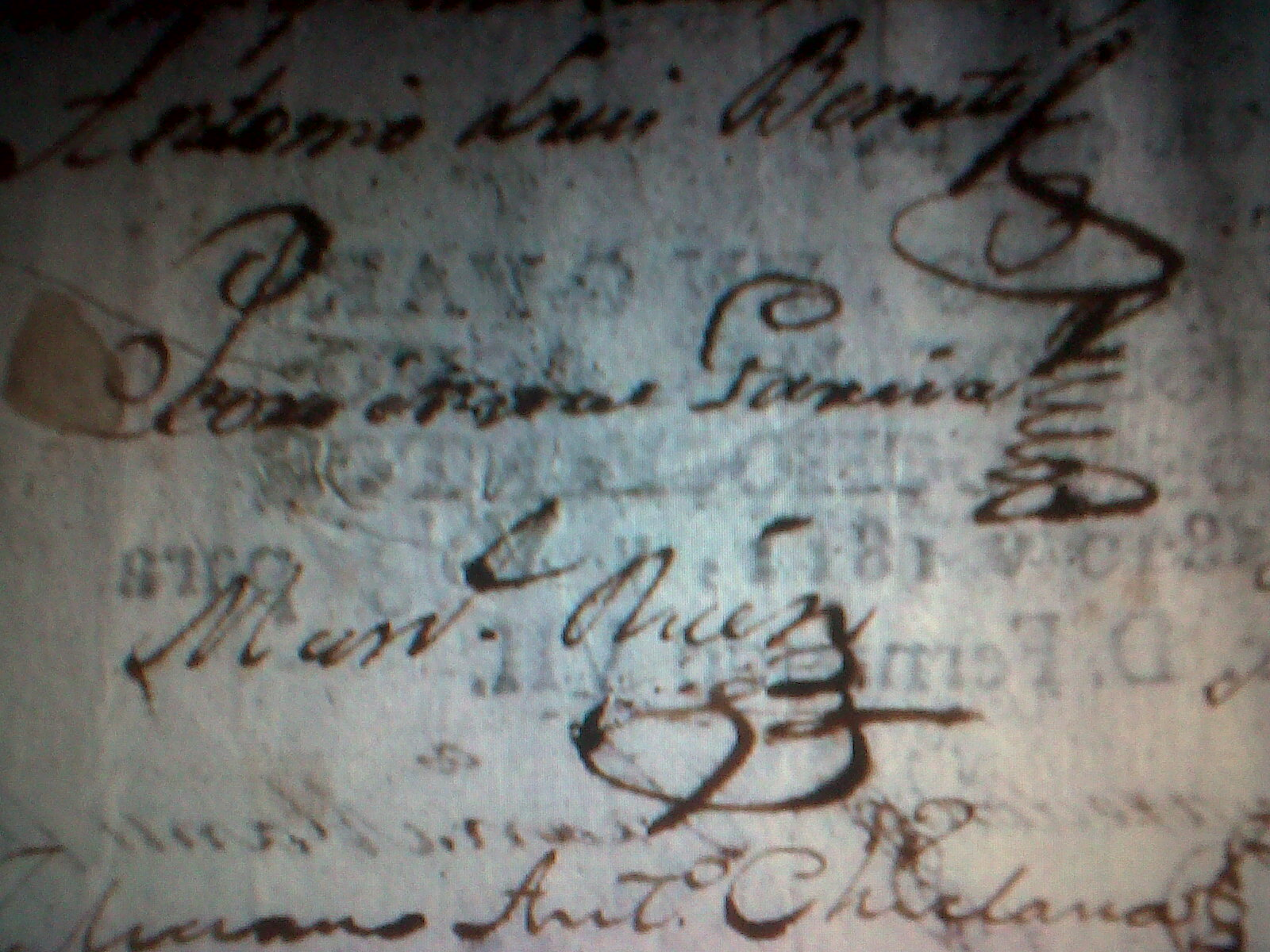 Detalle de la firma de Pedro Andres Garcia de Sobrecasa, realizada sobre el petitorio de los vecinos de Buenos Aires el 25 de mayo de 1810.